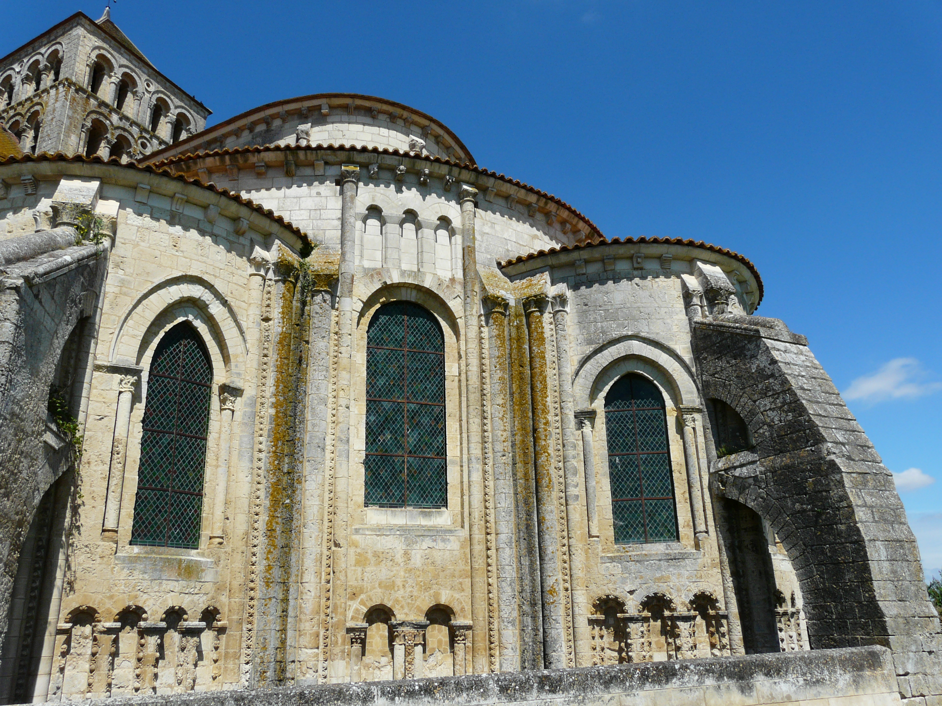 Abside et chapelles absidiales, abbaye Saint-Jouin-de-Marnes, Deux-Sèvres, France